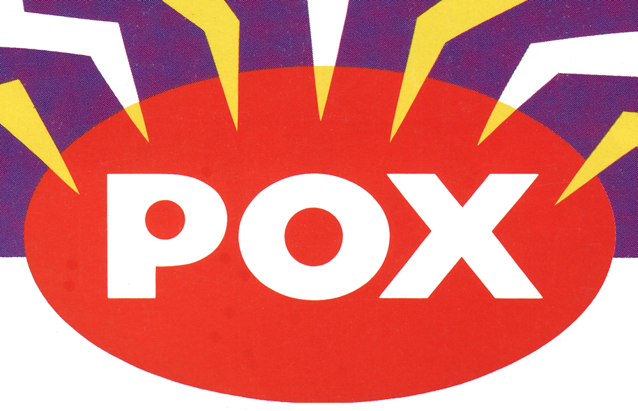 Omslagstitel till tidningen Pox. Denna logotyp/titel användes 7/1991–1/1993.